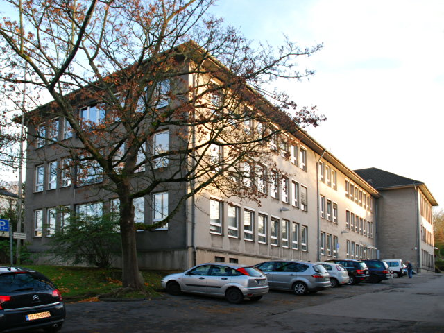 Rathaus Schwelm, Verwaltungsgebäude 1, Hauptstraße 14